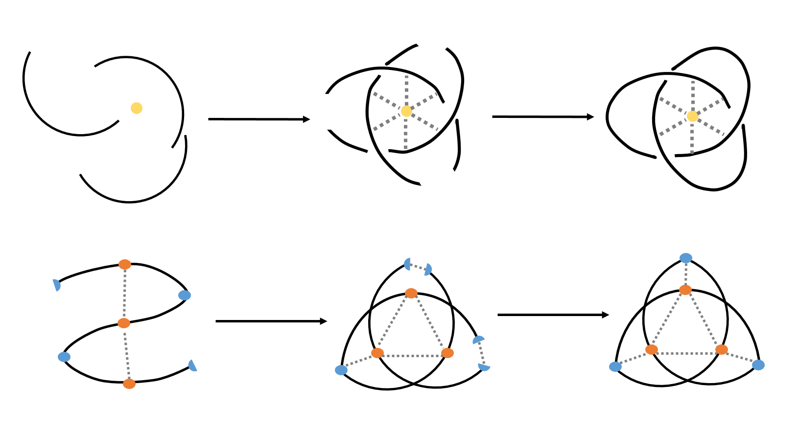 Estratégias para organizar blocos de construção para síntese de nós moleculares. Acima organização por elemento de coordenação. Abaixo auto organização pro interações inter e intramoleculares. Círculos representam elementos ou grupos de interação.Linhas tracejadas representam interações entre grupos, linhas sólidas representam cadeia principal das moléculas.